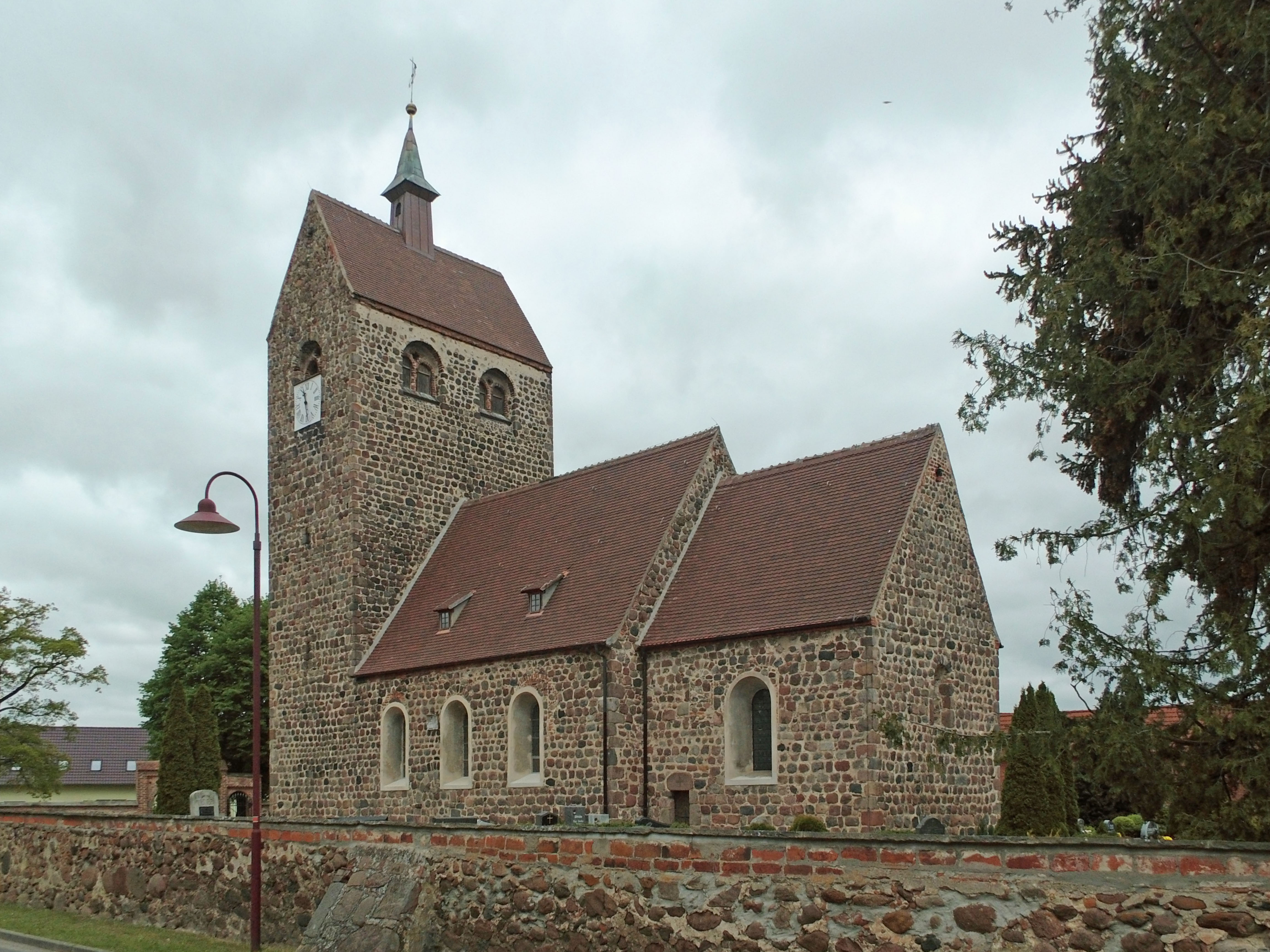 Evangelisch-lutherische Kirche in Flessau (Landkreis Stendal), Ortsteil von Osterburg (Altmark).